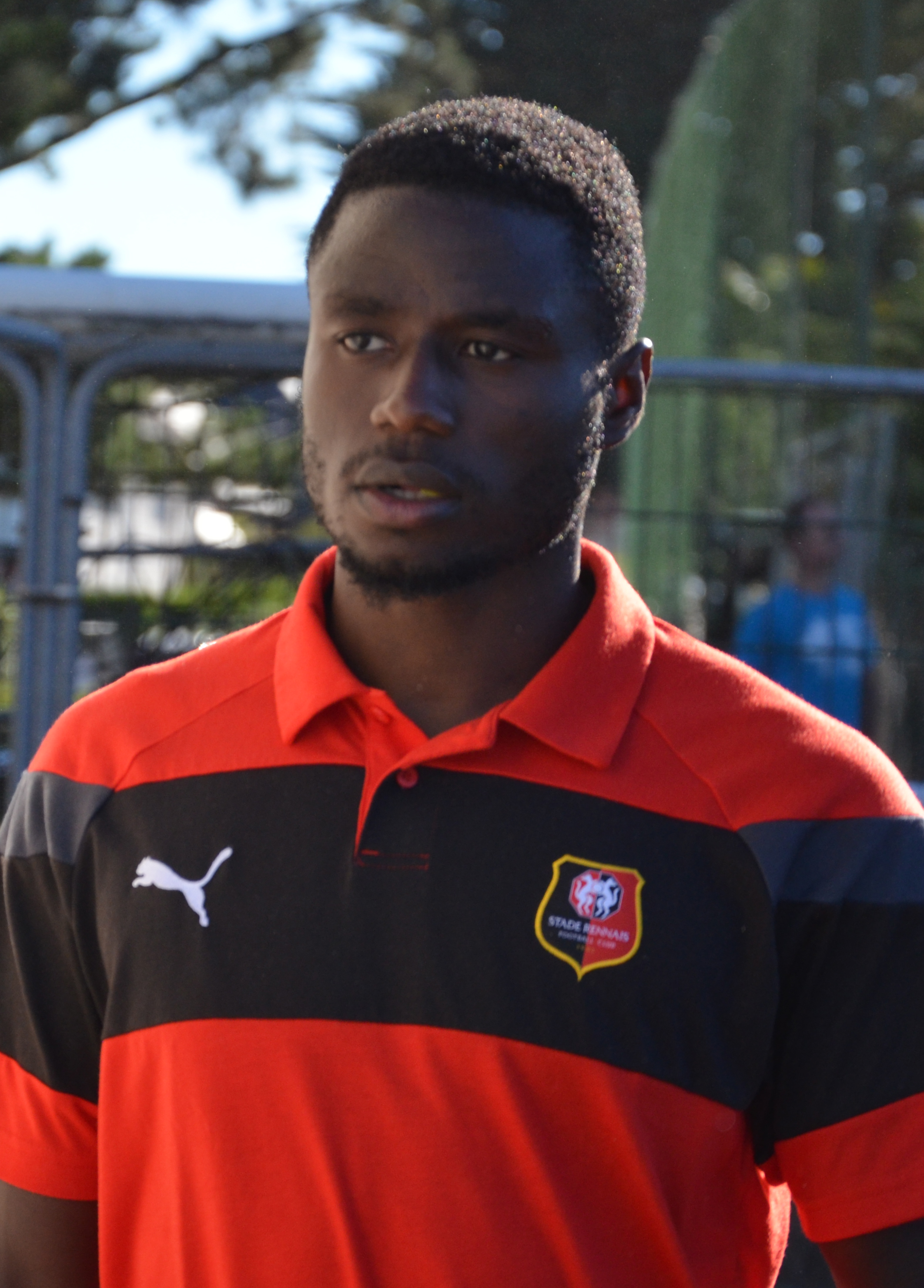 Photographie prise lors du match opposant le Stade rennais à l'USM Alger en match amical au stade Paul-Audrin de Dinard le 16 juillet 2016. Ici, Paul-Georges Ntep.